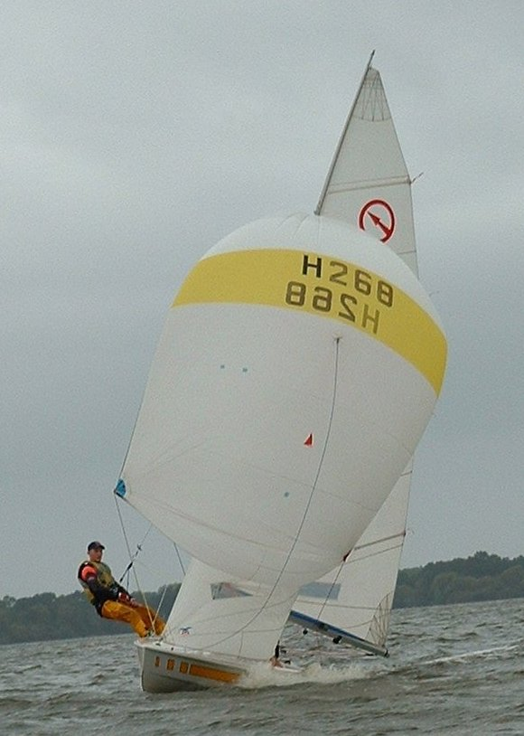 Javelin unter Spi